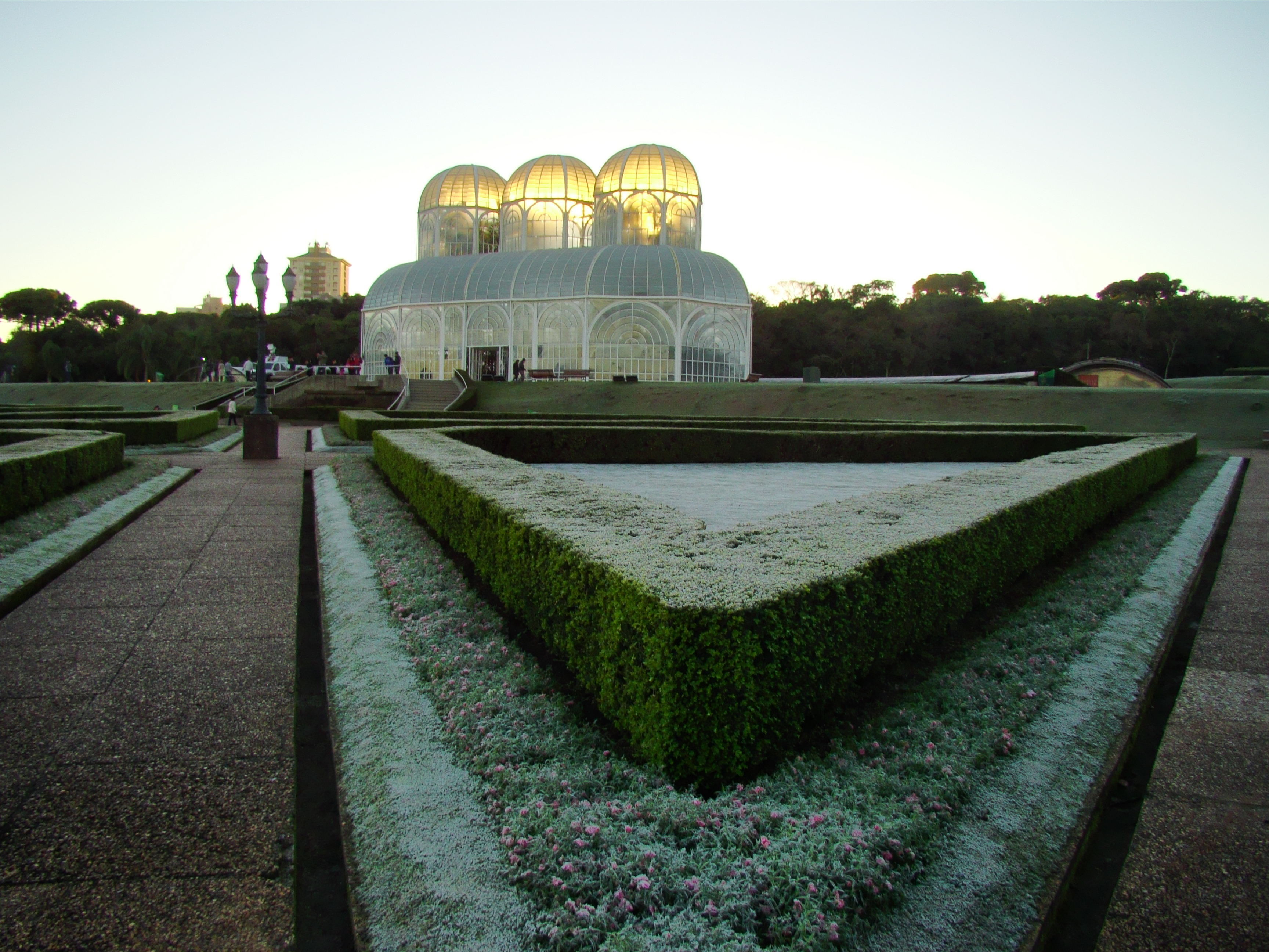 Geada cobrindo o Jardim Botânico de Curitiba, capital do Estado do Paraná, Sul do Brasil.